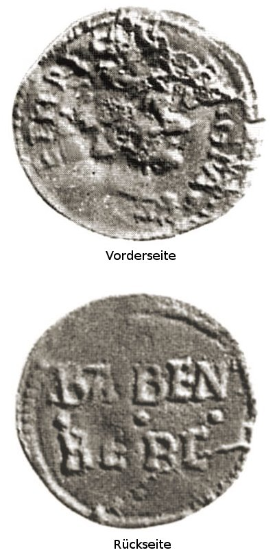 Der im Burgkunstadter Rathaus gefundene Silberdenar Heinrichs des II.